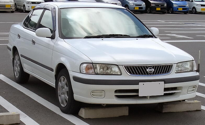 日産・サニー（B15型）